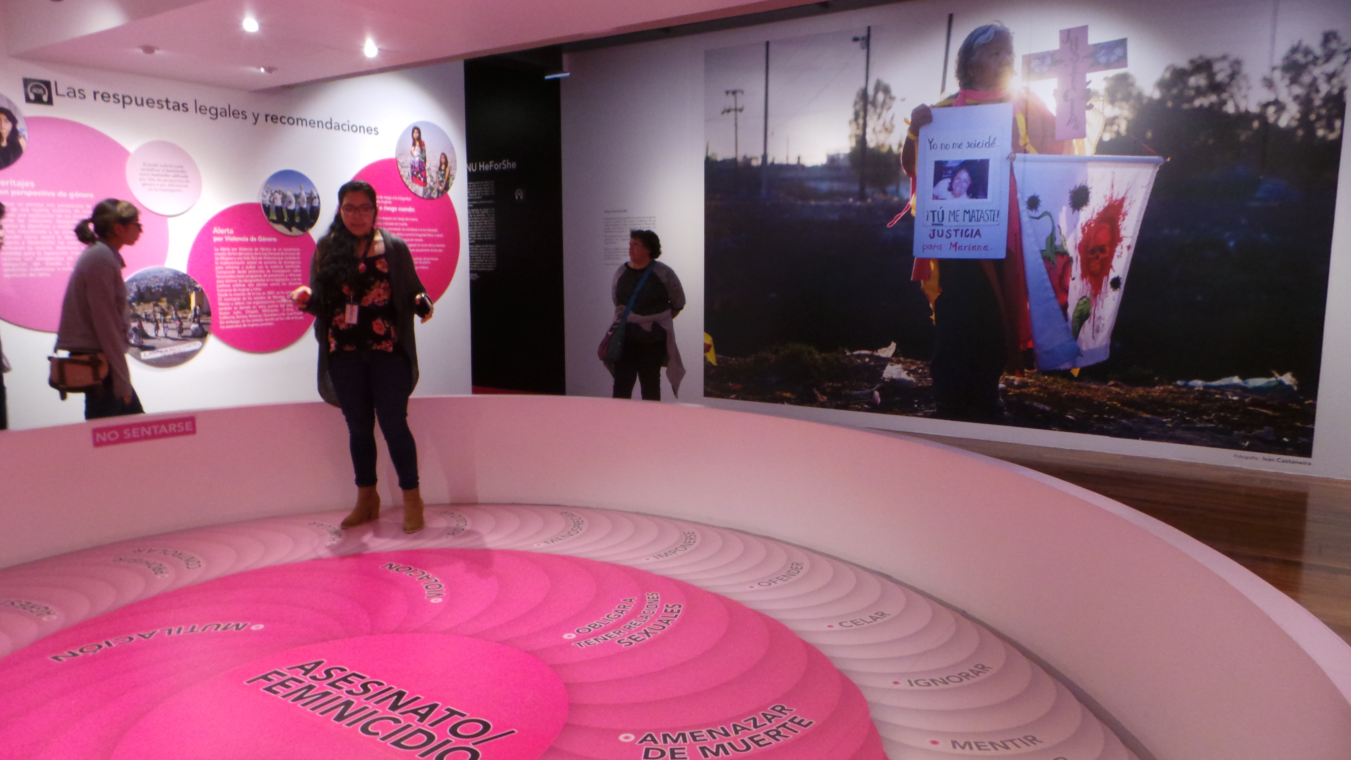 Sala sobre la espiral de la violencia contra las mujeres en la exposición temporal "Feminicidio en México ¡Ya Basta!" del Museo Memoria y Tolerancia de Ciudad de México